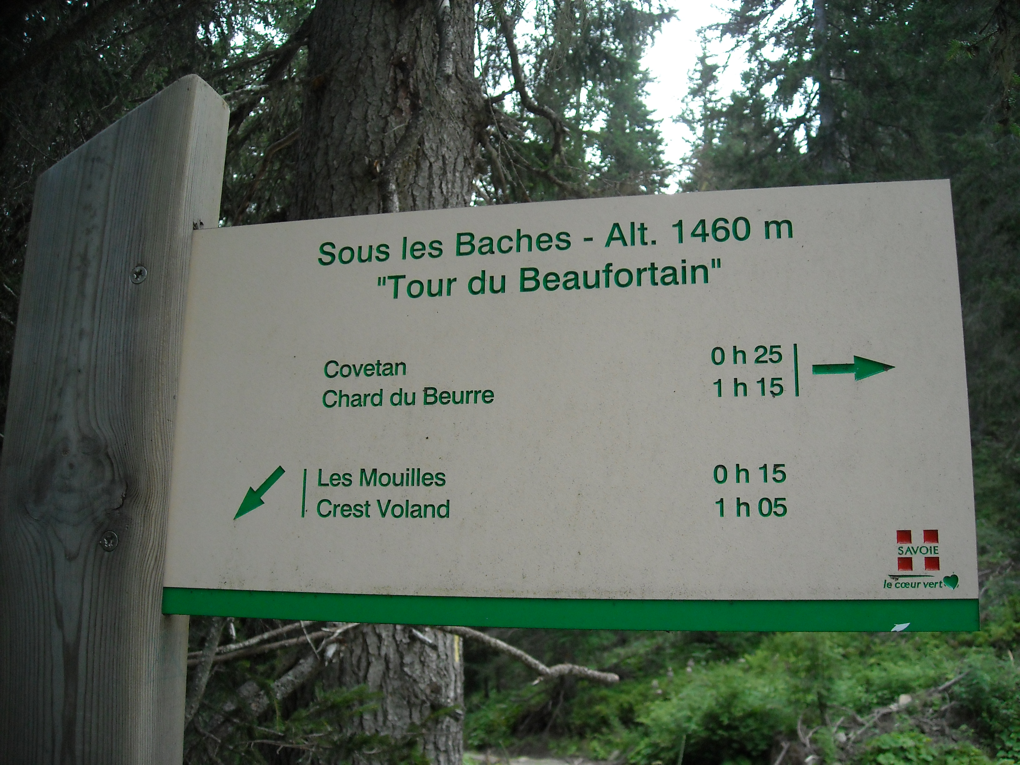 Signalisation 2008 Savoie.